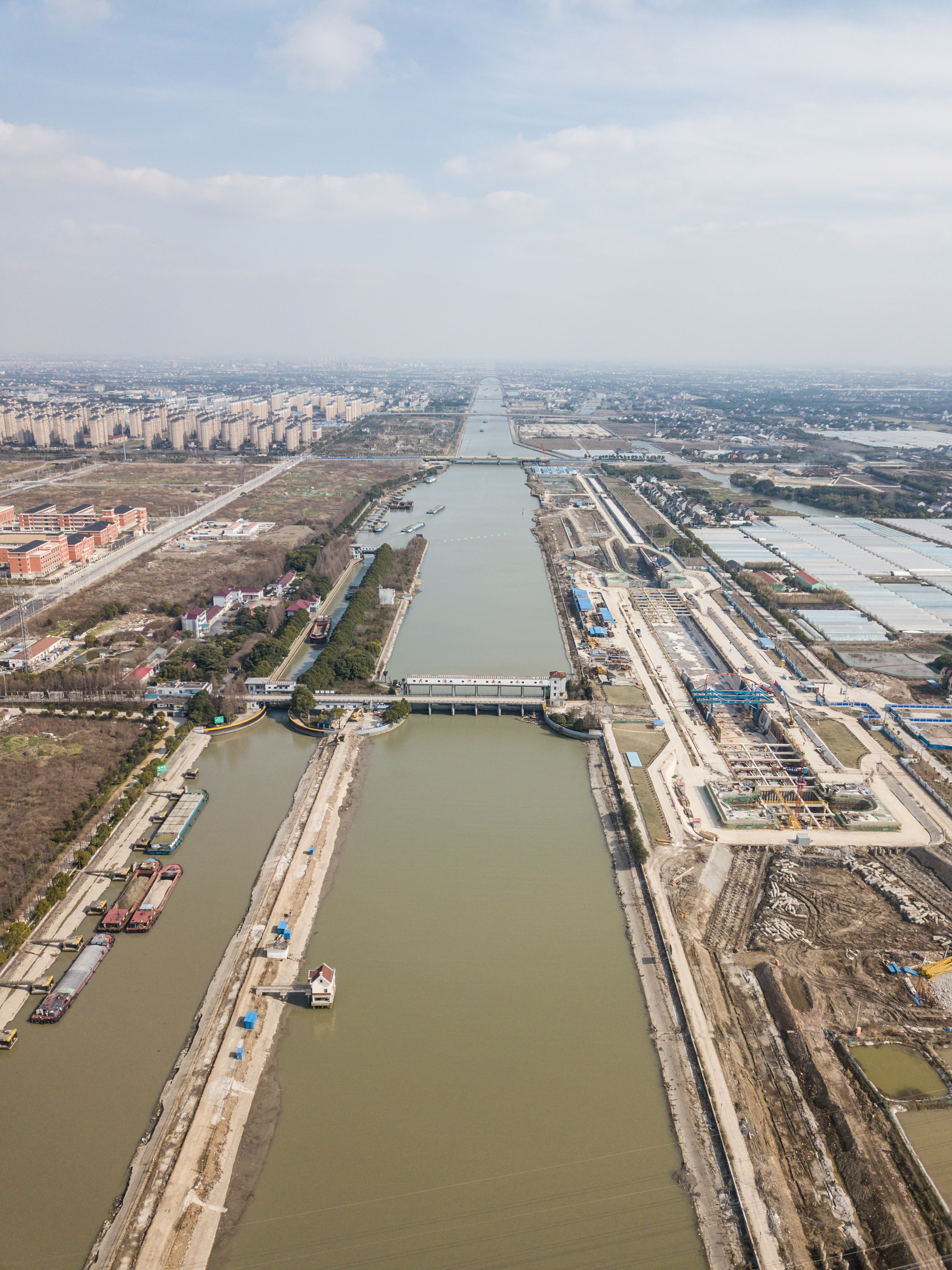 中文（中国大陆）: 位于闵行区的大治河段，靠近黄浦江入河口，无人机拍摄